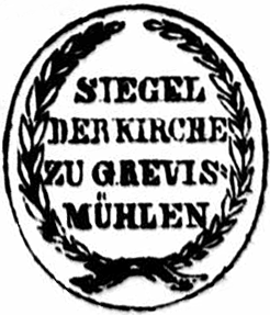 Grevesmühlen, Siegel mit der Inschrift „Siegel der Kirche zu Grevismühlen“